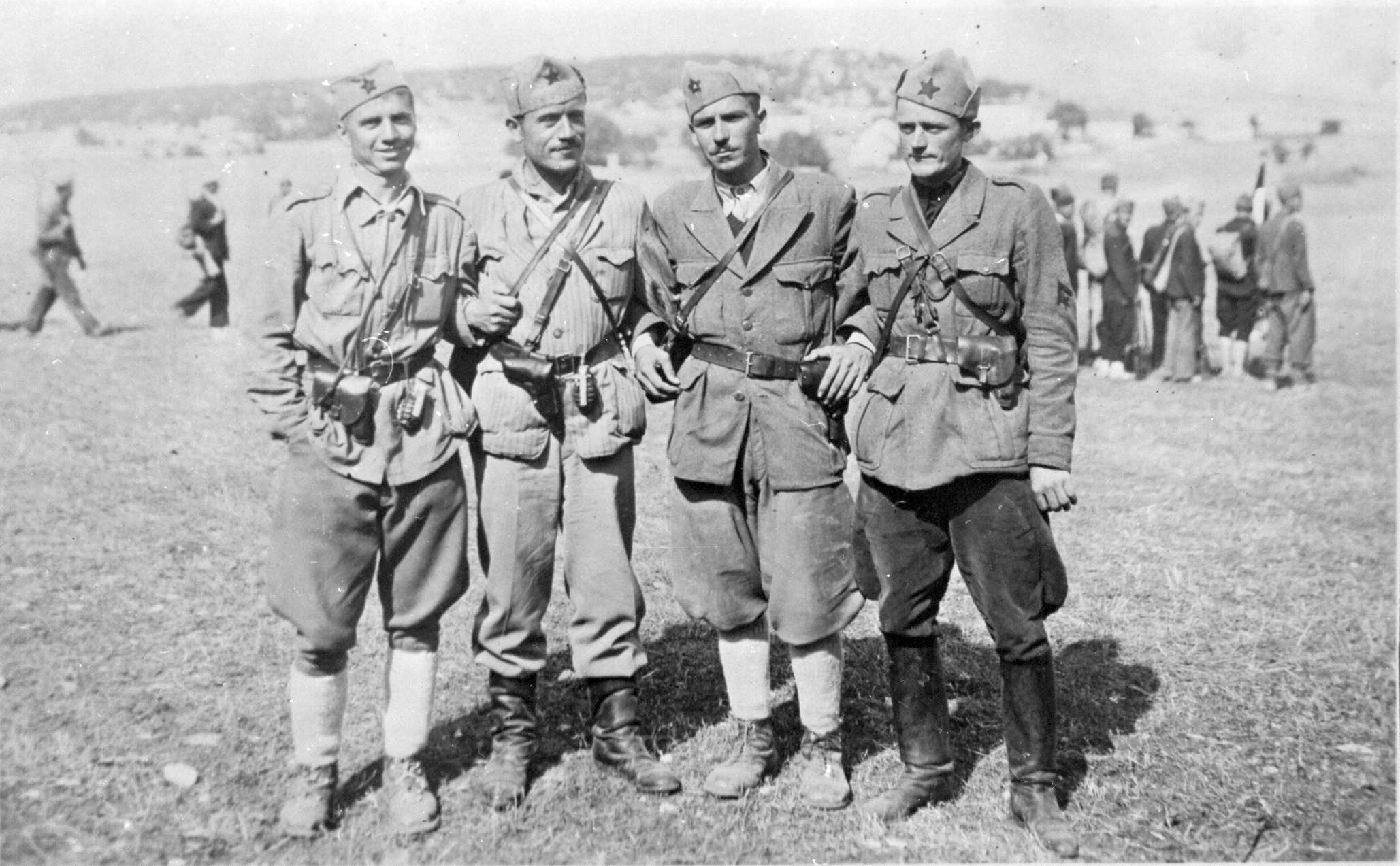 Srpskohrvatski / српскохрватски: Štab Prve dalmatinske brigade u vreme njenog formiranja. Sleva na desno: Vlado Šćekić, Pero Ćetković, Ante Kronja i Bozo Bilić - Marjan.